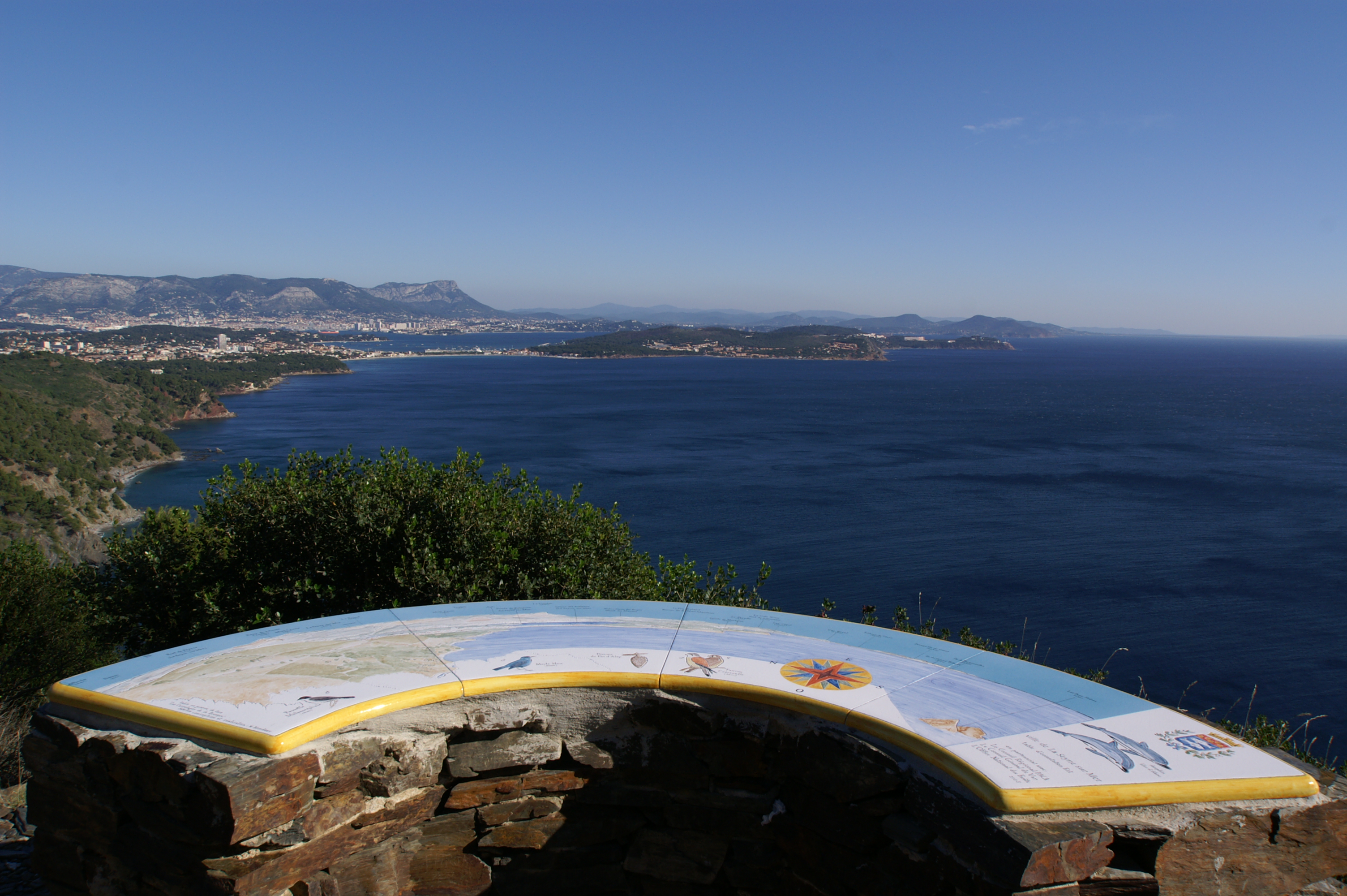 Table d'orientation située sur la colline du cap-Sicié, et d'où l'on peut voir de gauche à droite au premier plan, la côte du Cap-Sicié à la plage des Sablettes (commune de La Seyne-sur-Mer) puis la presqu'île de Saint-Mandrier-sur-Mer. à l'arrière plan, la ville de Toulon surmontée du mont Faron et du mont Coudon, et la côte qui se prolonge à l'Est avec les îles d'Hyères.